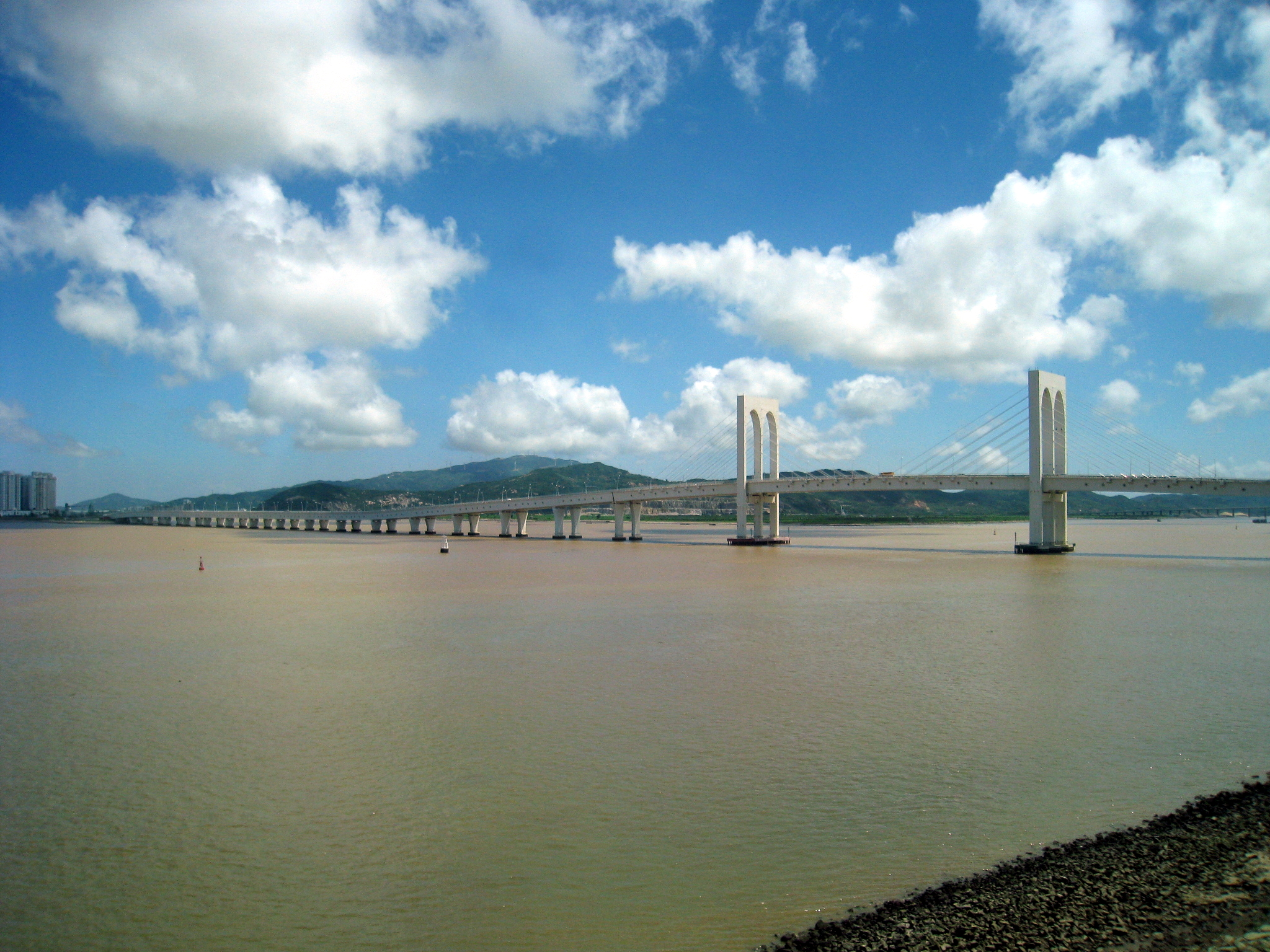 Macau Ponte de Sai Van 澳門 西灣大橋